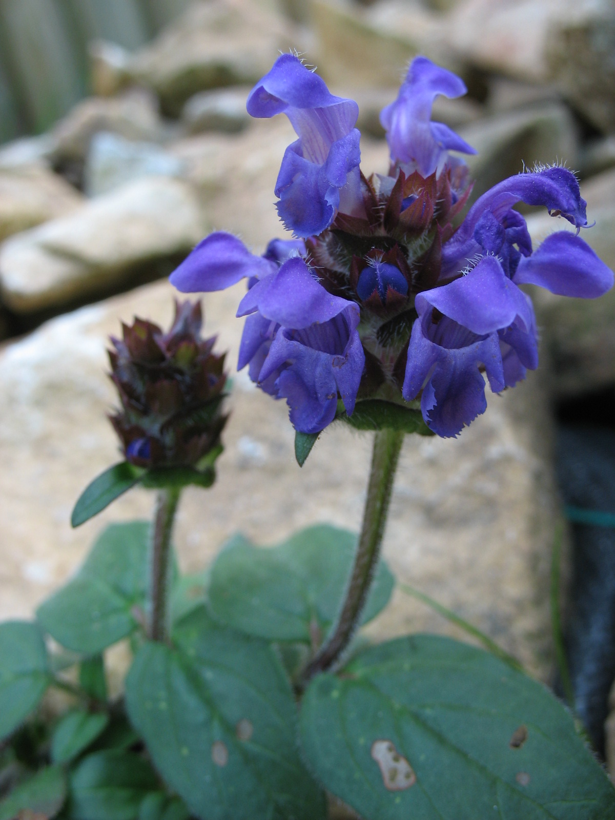 Prunella grandiflora. Jardín botánico de las Pardines. Encamp, Andorra.